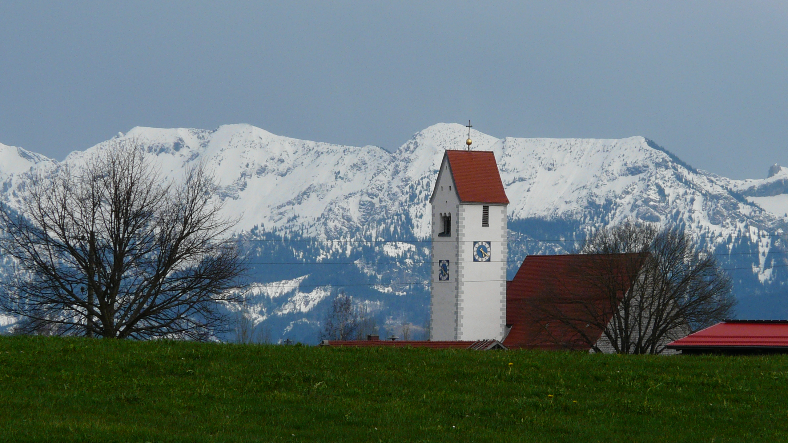 Lengenwang, Ostallgäu - Kirche mit schneebedecktem Ammergebirge